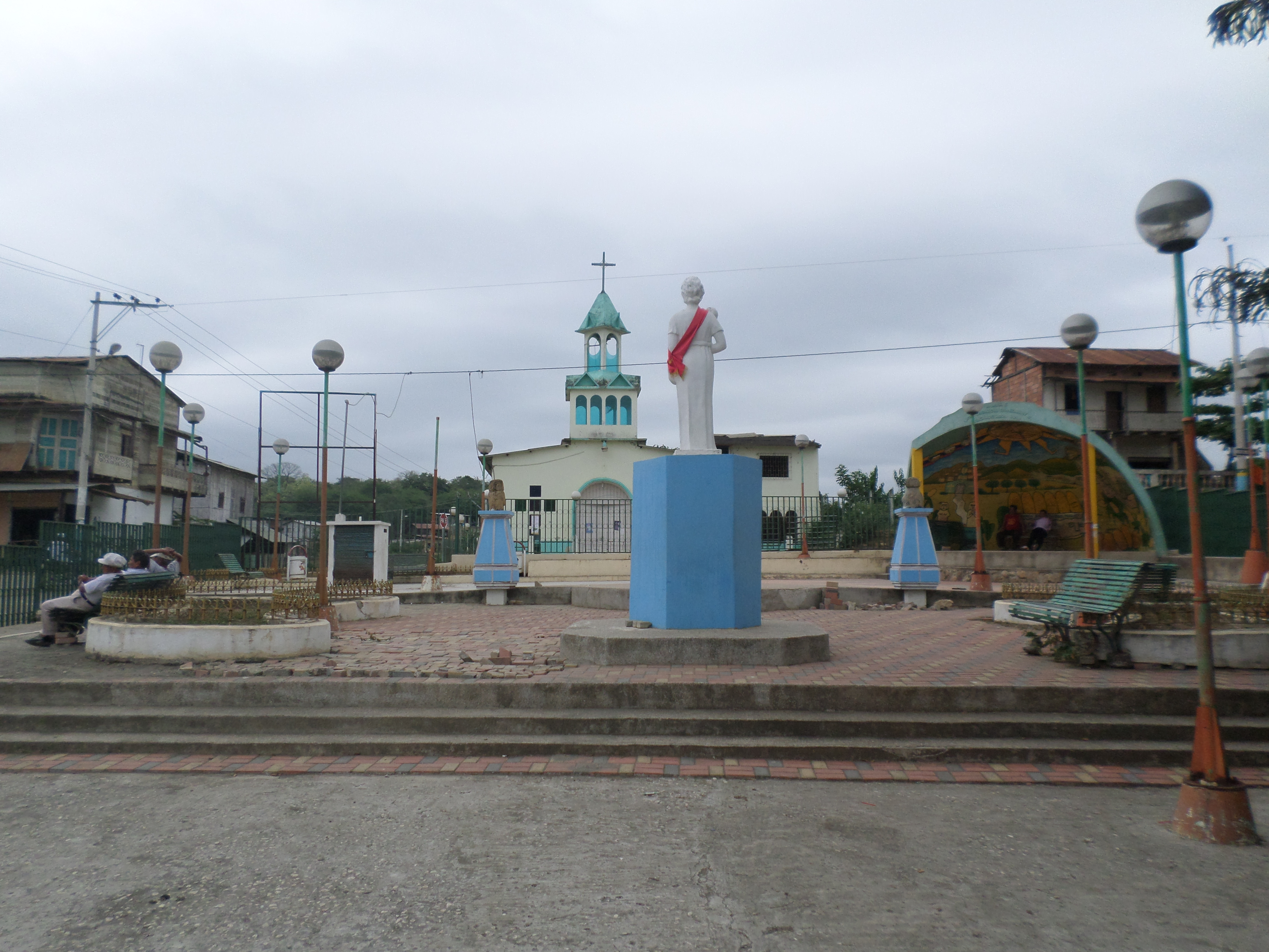 Vista del parque central de Simón Bolívar